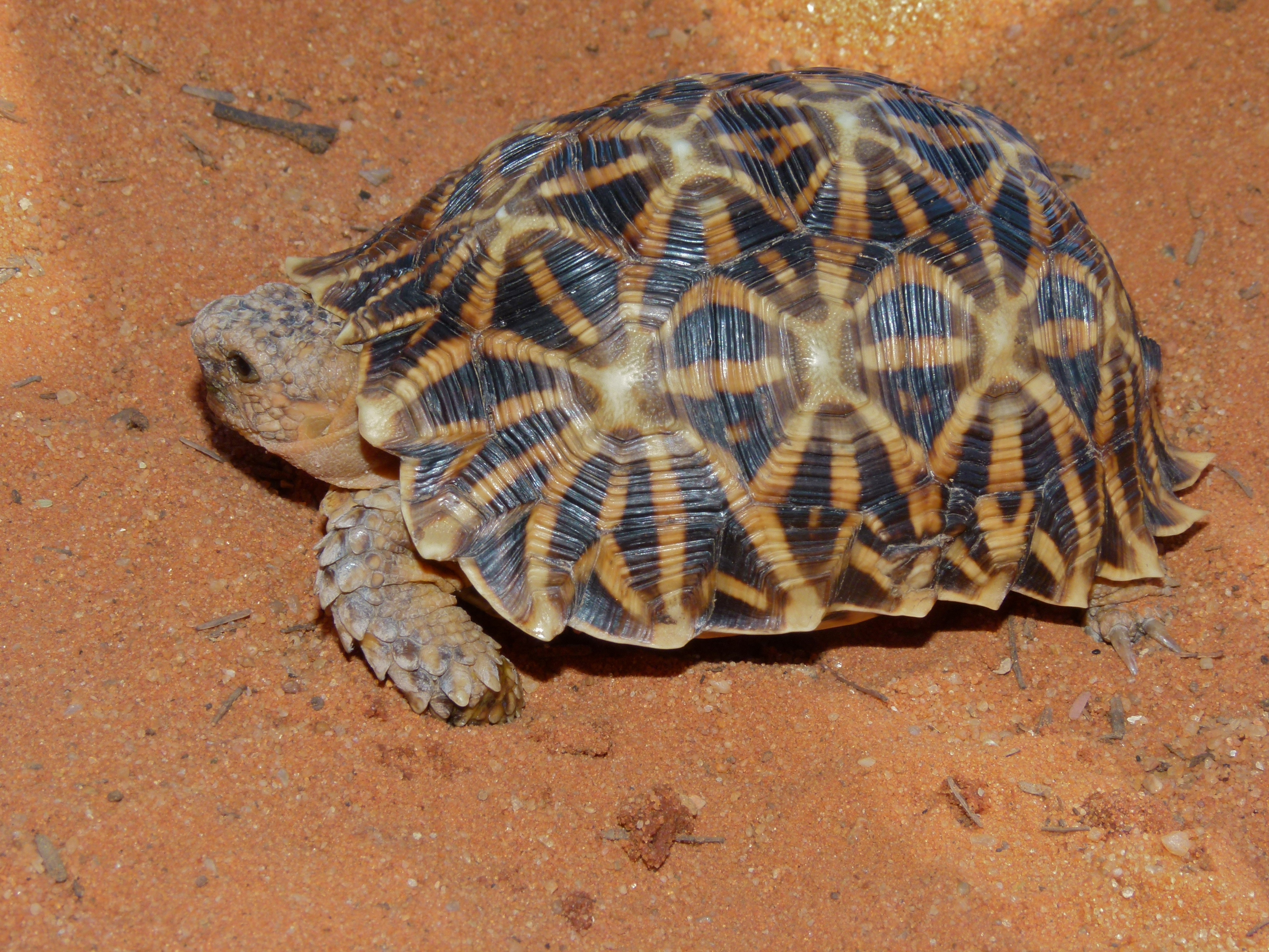 Auob Riverbed, Kgalagadi Transfrontier Park, SOUTH AFRICA